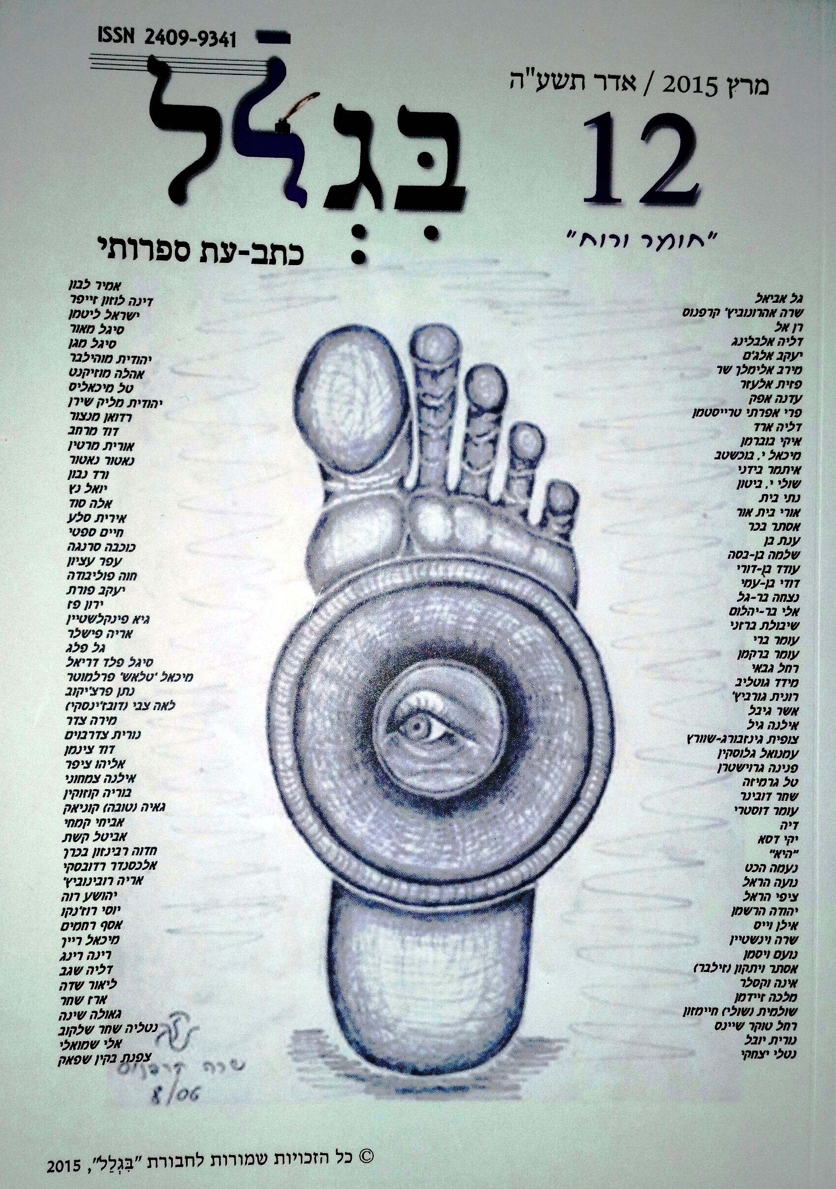 כרך 12 של כתב-העת הספרותי "בגלל". ציור עטיפה: שרה אהרונוביץ' קרפנוס. עיצוב: חבורת "בגלל"